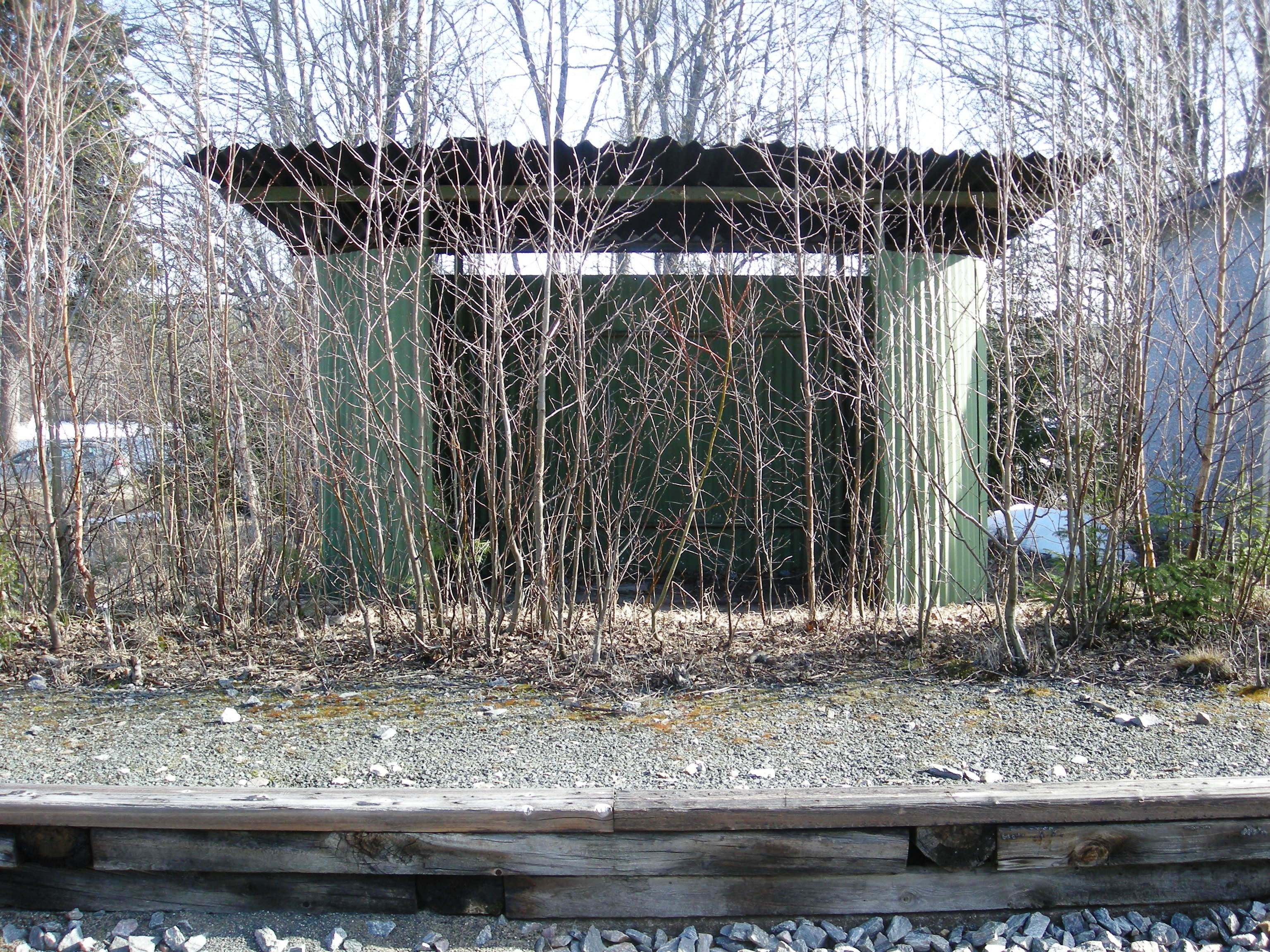 Leskuret på Øksna holdeplass i 2010